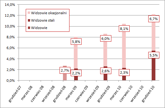 Wykres oglądalności kanału Biełsat TV.